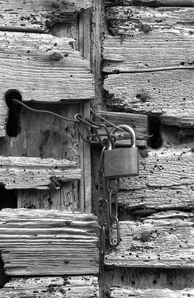 Immagine Marco Fodde